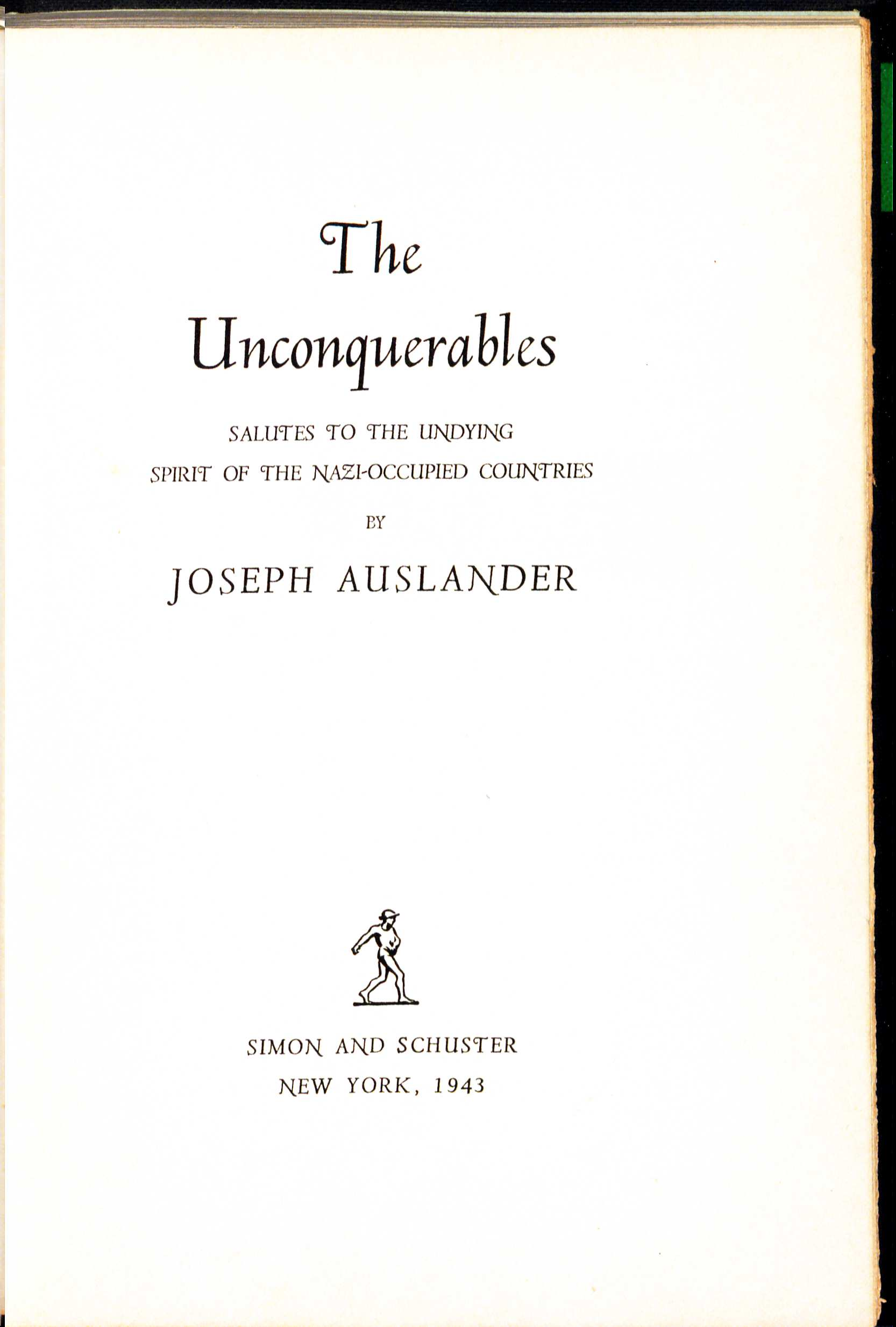 Joseph Auslander: The Unconquerables: Salutes to the Undying Spirit of the Nazi-Occupied Countries. New York : Simon & Schuster, 1943